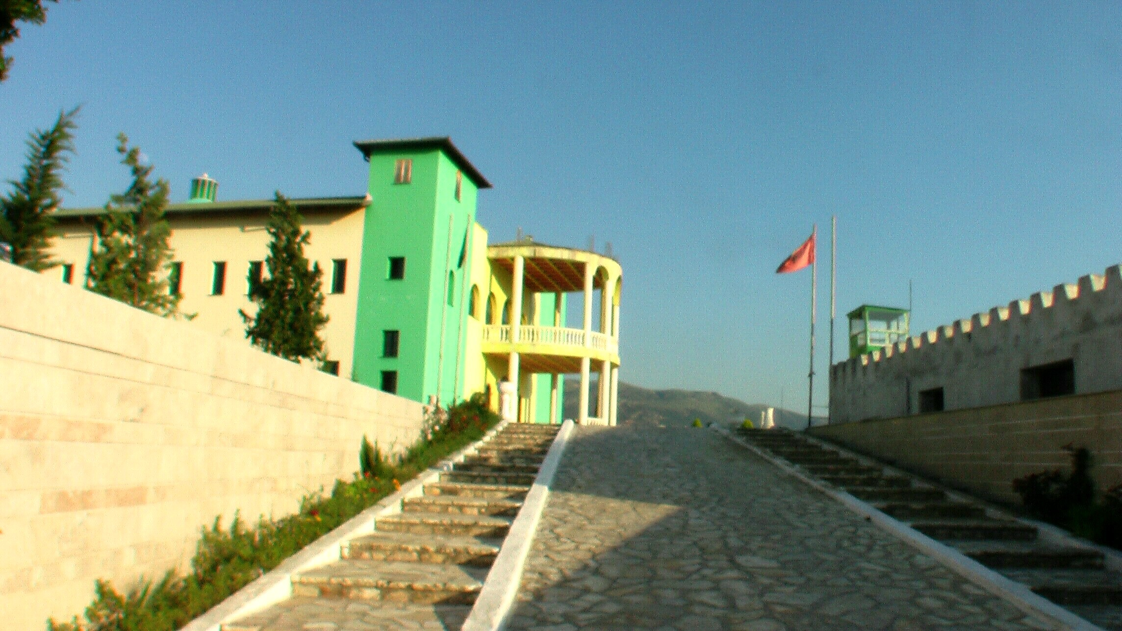 VlorëReligionsgemeindeHaus